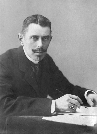 Eestimaa rüütelkonna peamees Otto von Lilienfeld (1865-...)